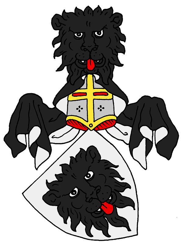 Stammwappen derer von Kahlden, schwarze Linie.